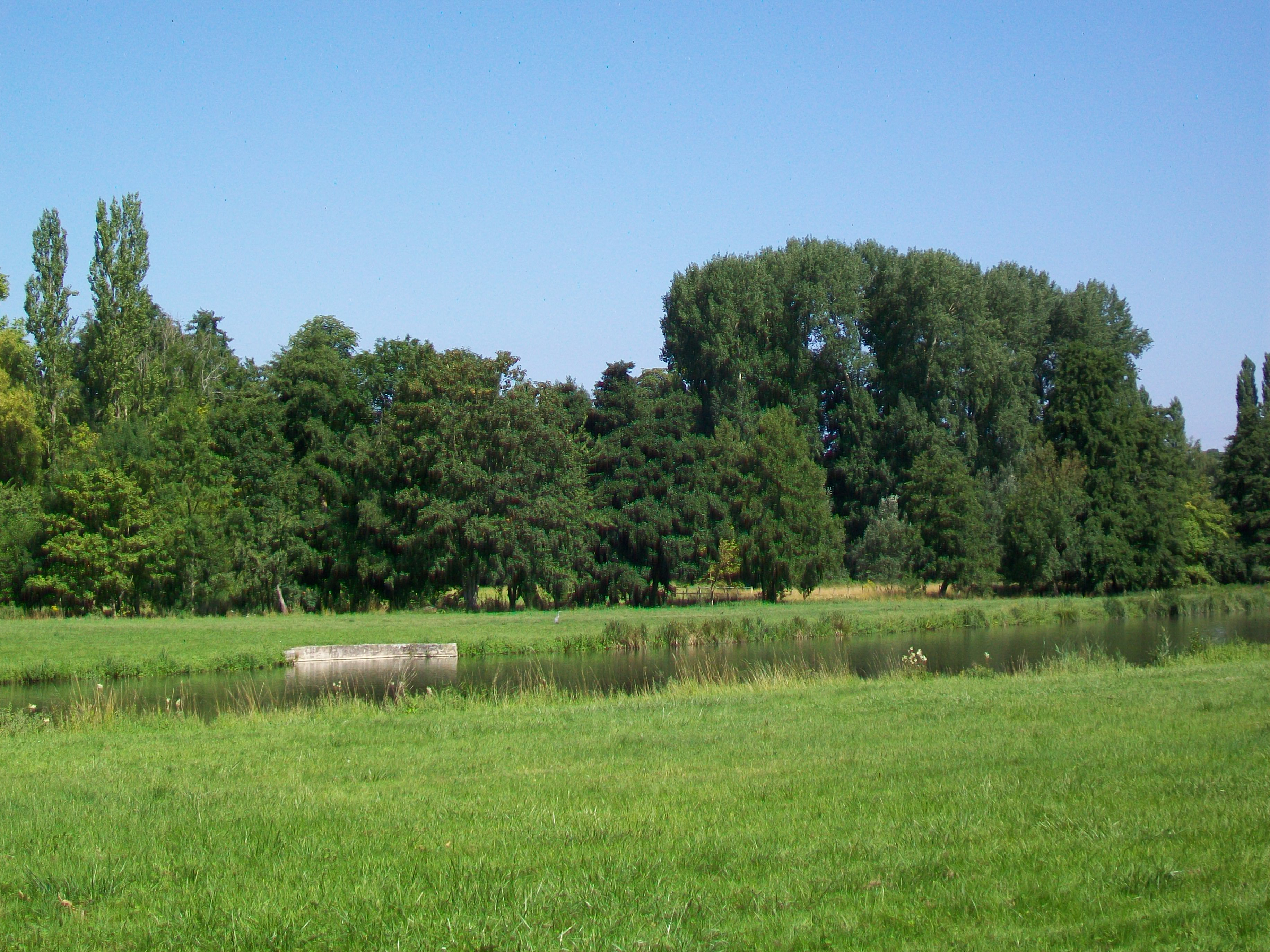 La « grande rivière » au « Petit Parc », au nord du château. Ce secteur ne fait pas partie du parc Jean-Jacques Rousseau. Il est entretenu par l'hôtel-restaurant du château.